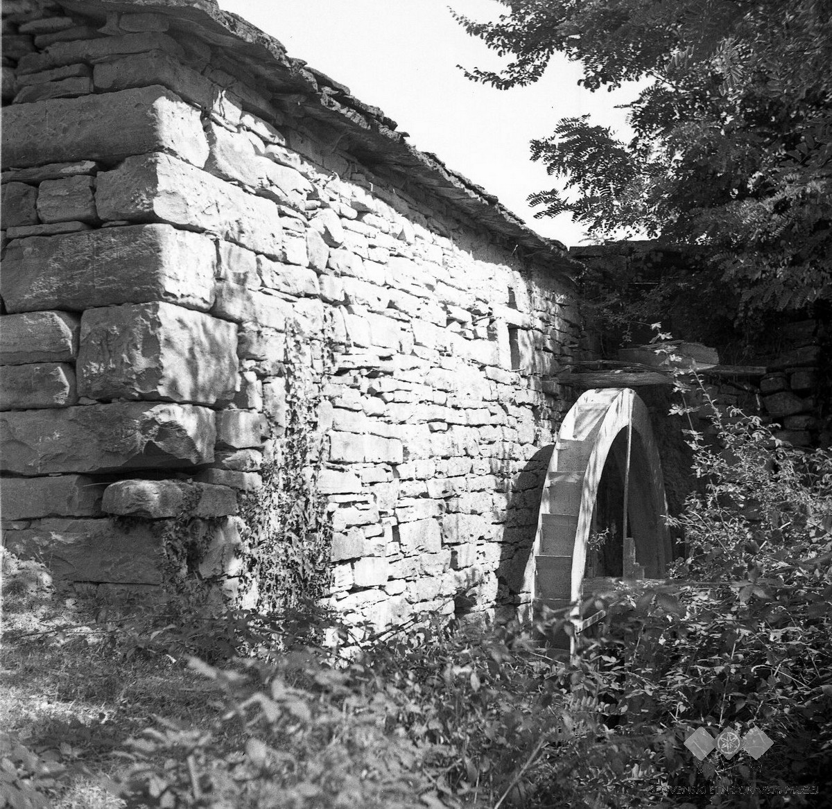 Mlin v Rokavi pod Glemom, Rojci.